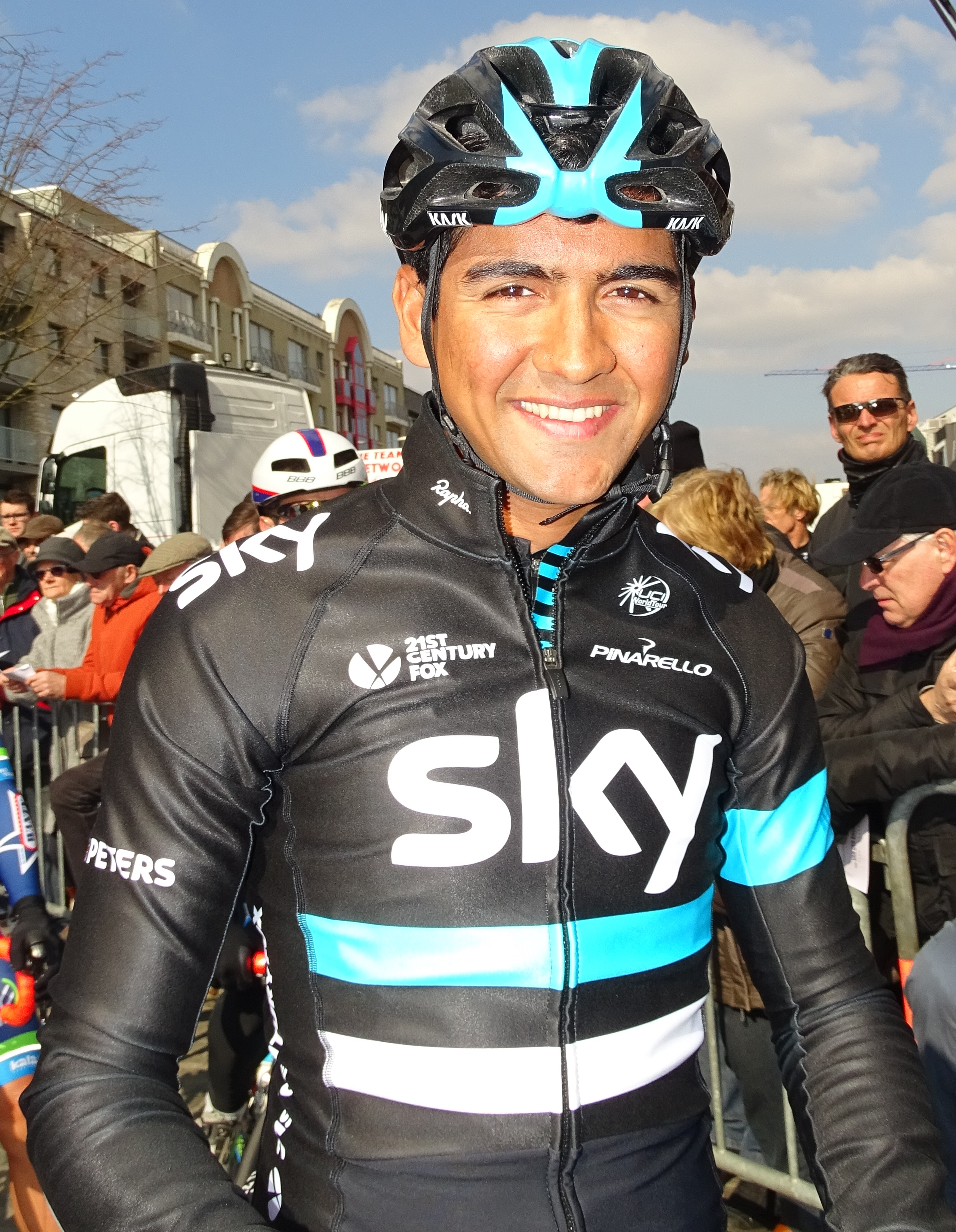 Reportage réalisé le mercredi 16 mars à l'occasion du départ de la Nokere Koerse 2016 à Deinze, Belgique.